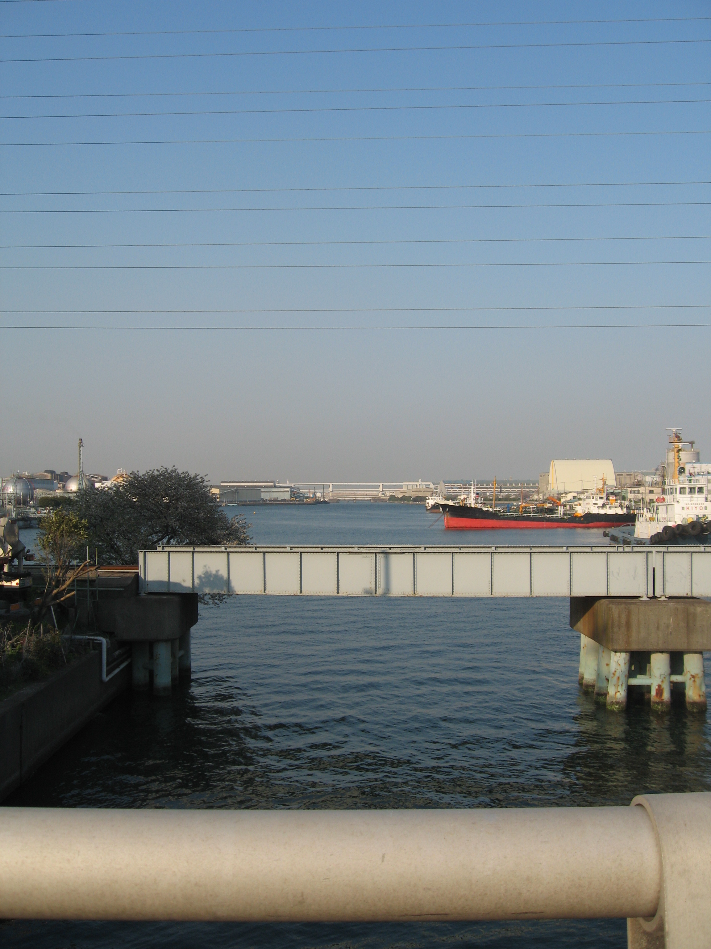 川崎区千鳥町にて、2007年3月29日にMay.Lowが撮影しました。